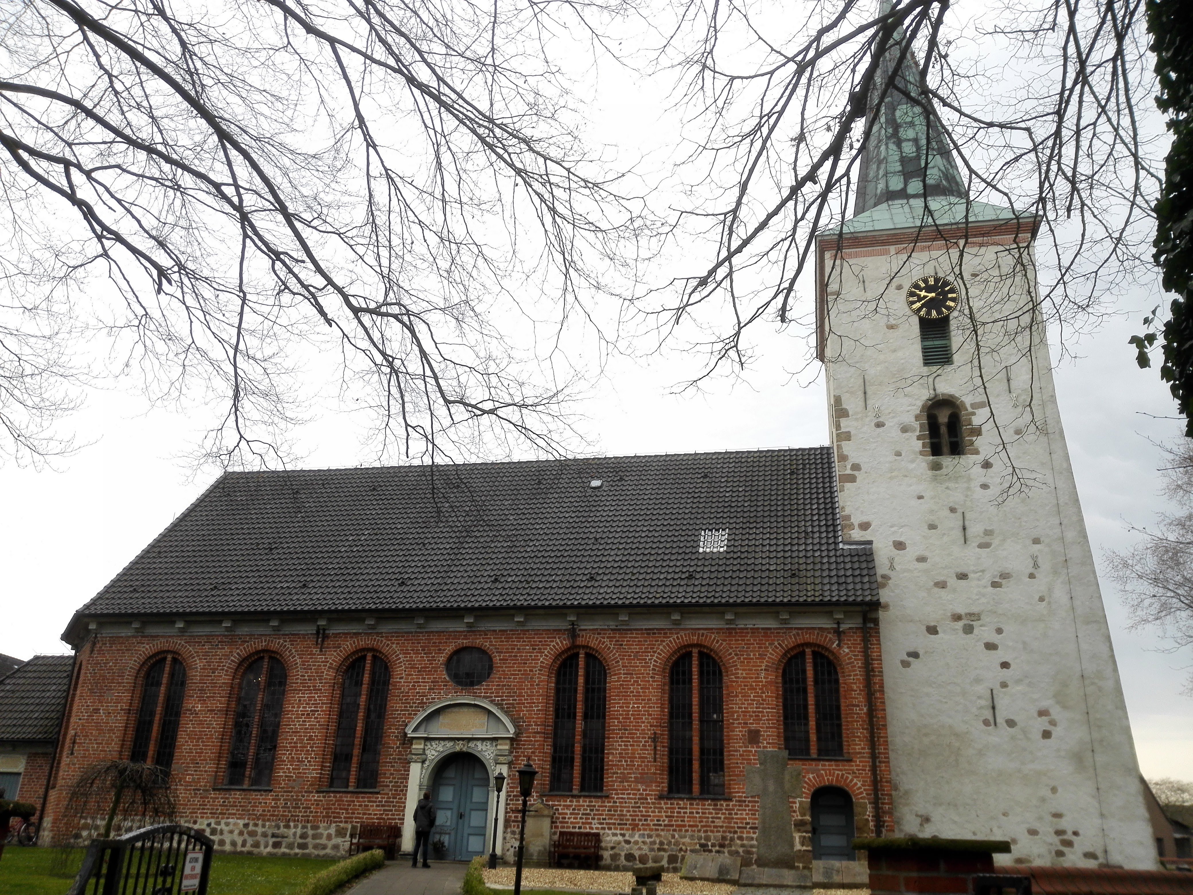 St. Petri-Kirche in Wilstedt, von Norden fotografiert.